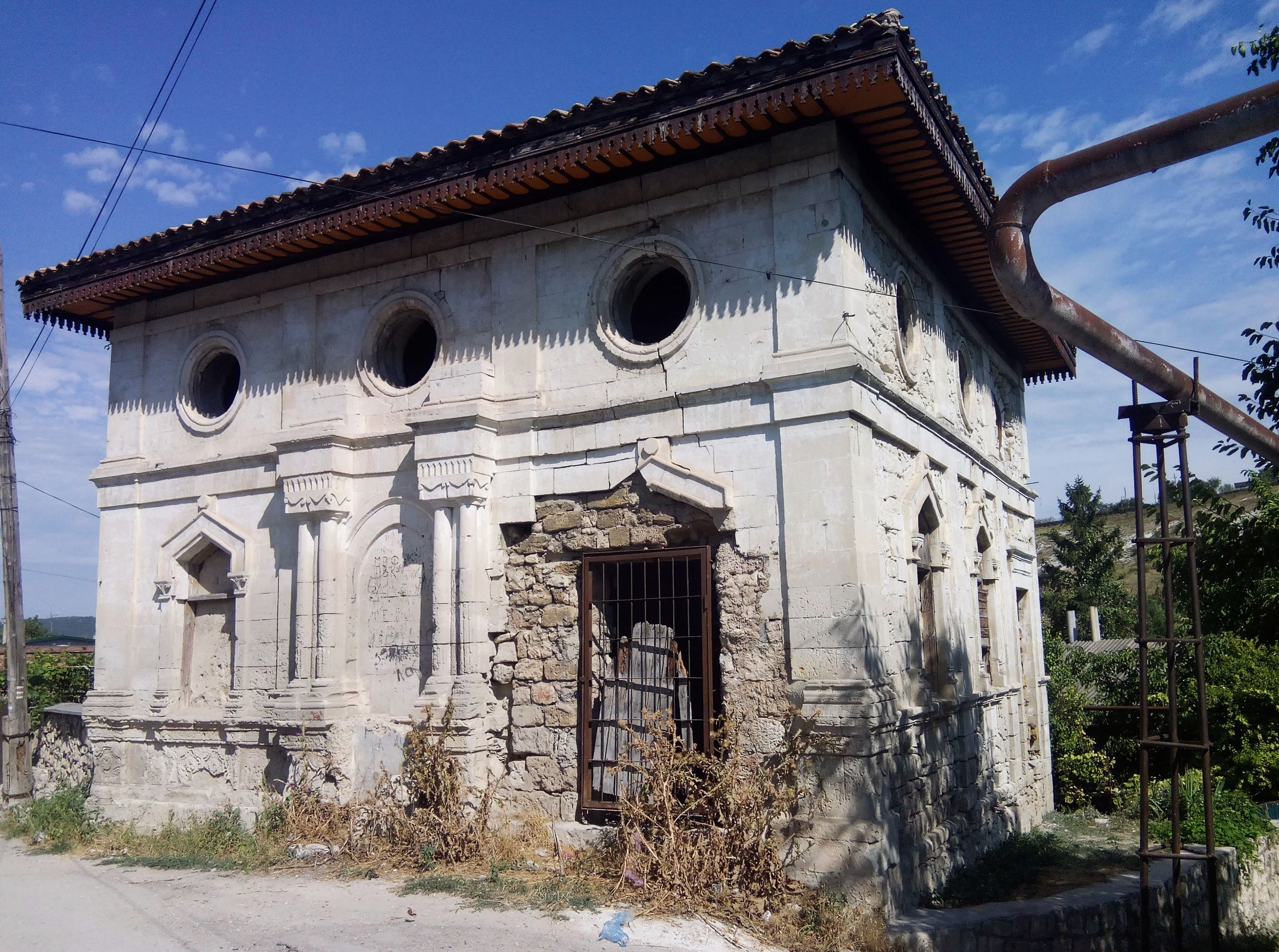 Мечеть Исми-хан: улица Севастопольская, 80, Бахчисарай, Бахчисарайский район, Крым This object is located on the Crimean Peninsula and recognized as cultural heritage by Russia under the monument ID: 8230101000. The legal status of the Crimean region is currently disputed.